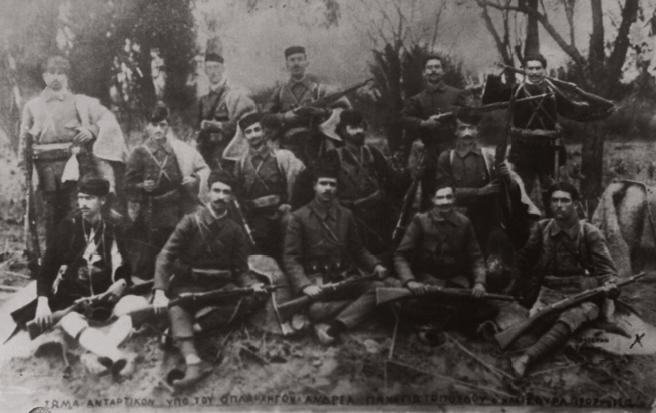 Христос Трандос